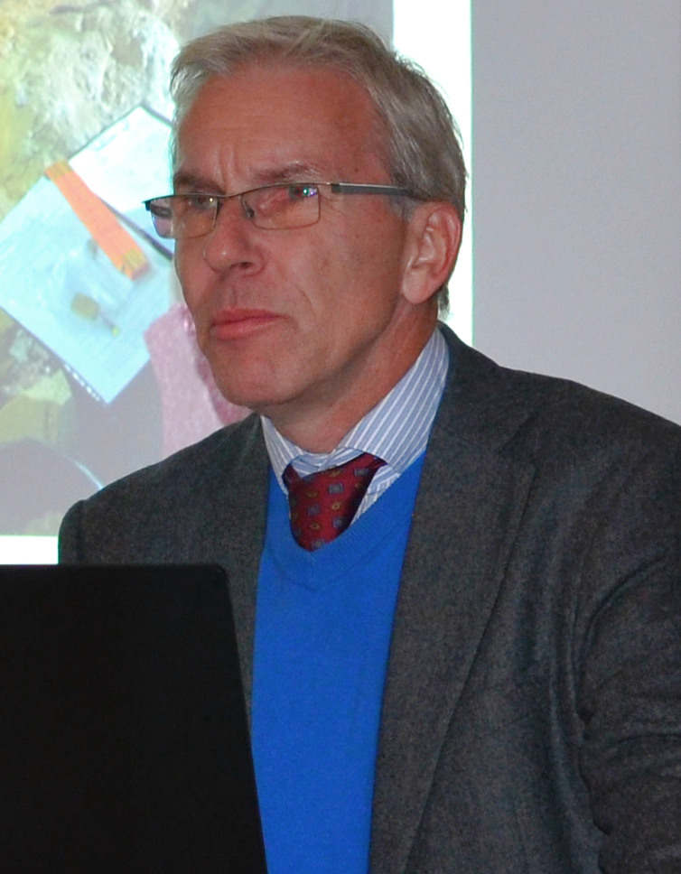 Bei der wissenschaftlichen Tagung zu den Harzhöhlen und ihr Kulturerbe am 14. Oktober 2016 in Scharzfeld